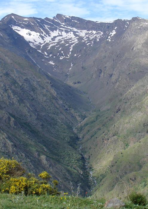 Valle del Guarnón